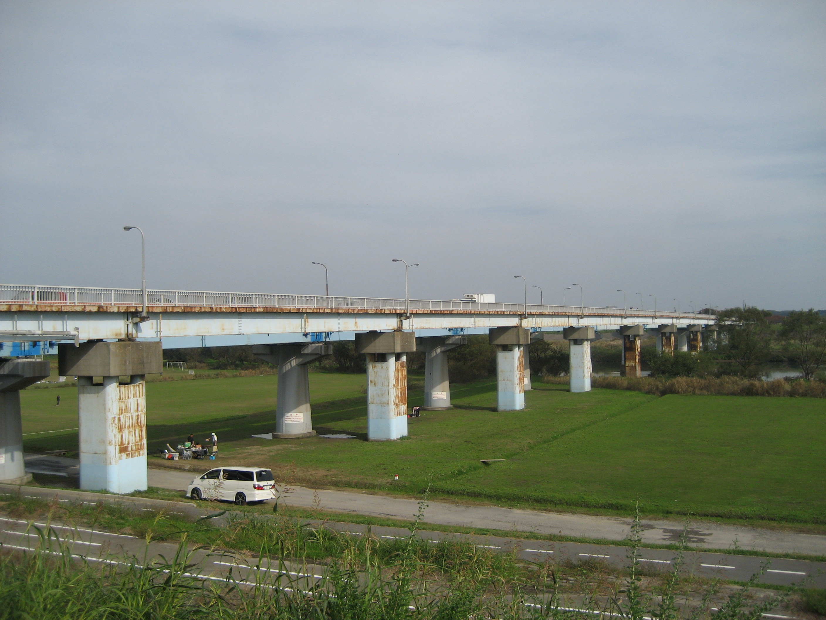 流山橋（埼玉県三郷市側から撮影）